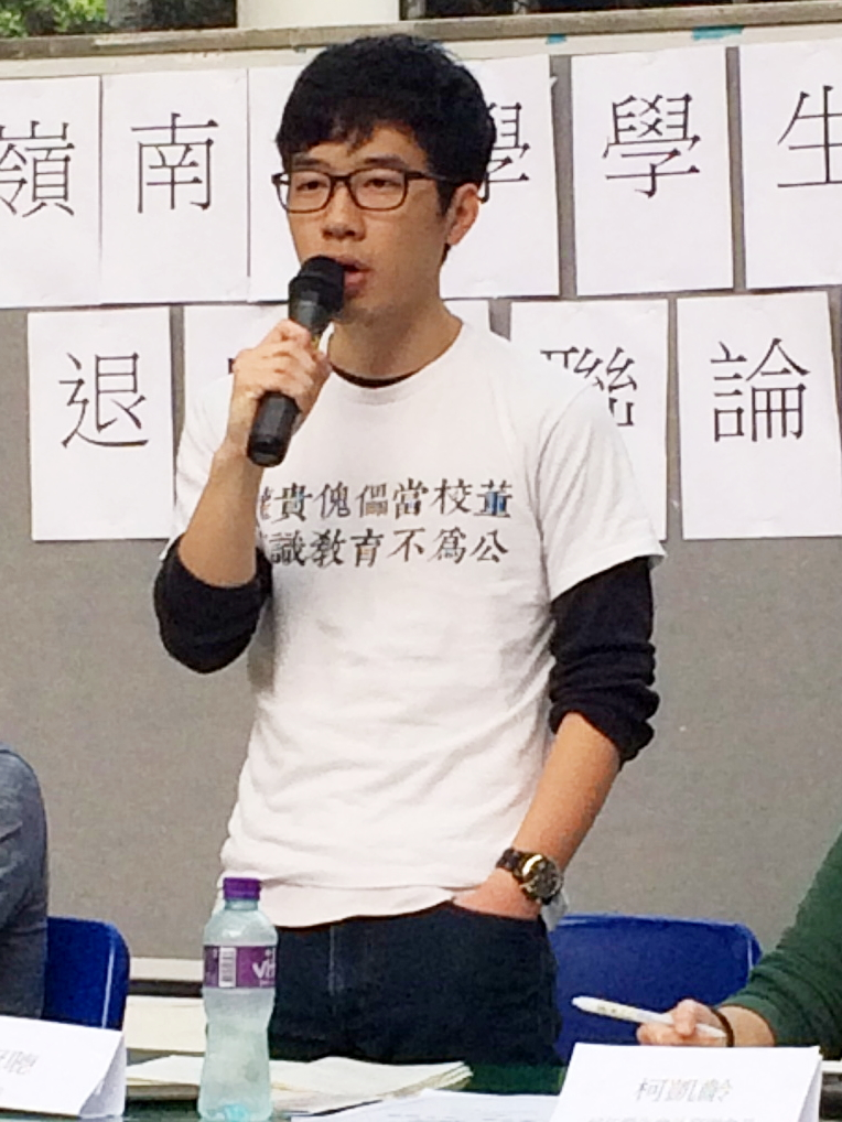 Nathan Law Kwun Chung